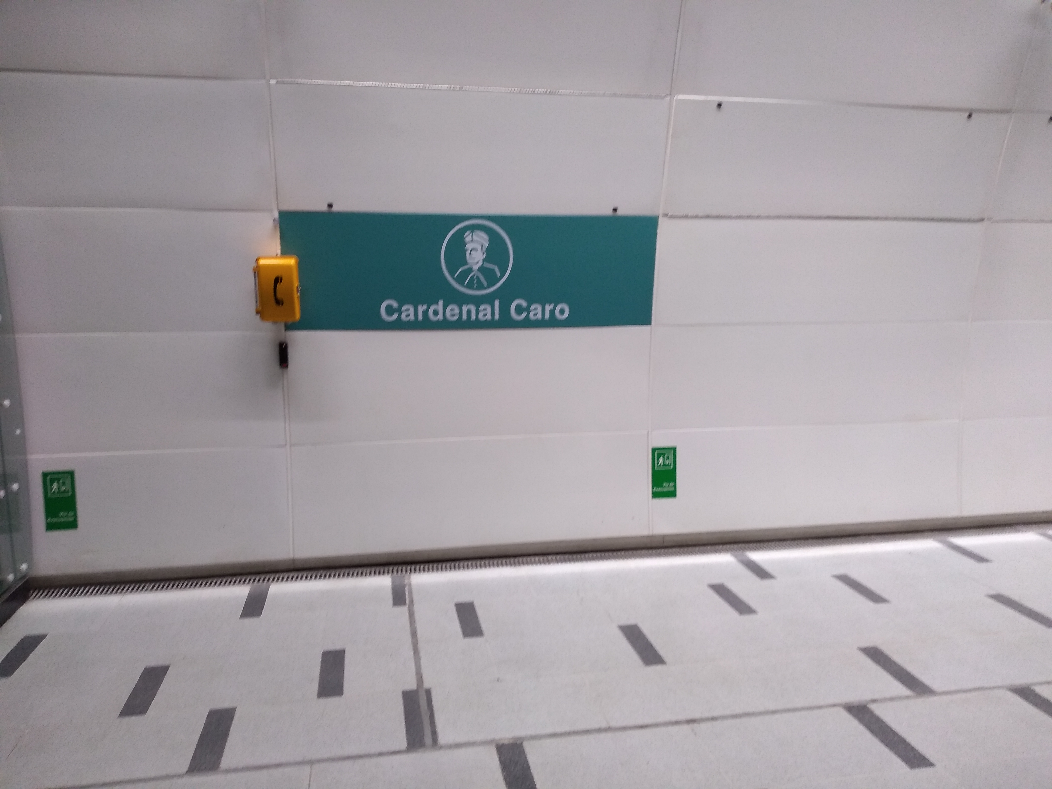 Estación Cardenal Caro